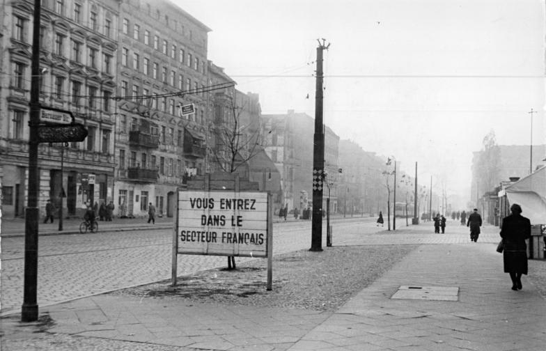 Zentralbild Quaschinsky 3.11.1955 Sektorengrenze in der Bernauer Strasse im Norden Berlins.